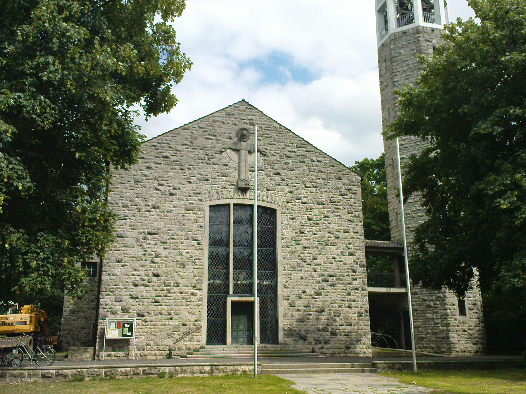 Christuskirche Wolfsburg